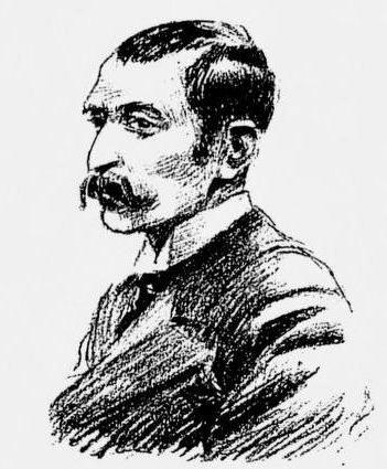 "Mathieu Dreyfus"